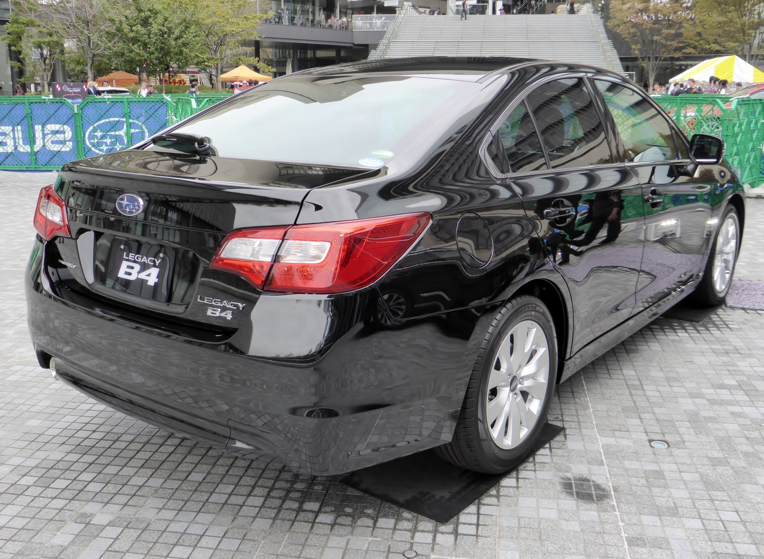 BN9型スバル・レガシィB4をリアから撮影。